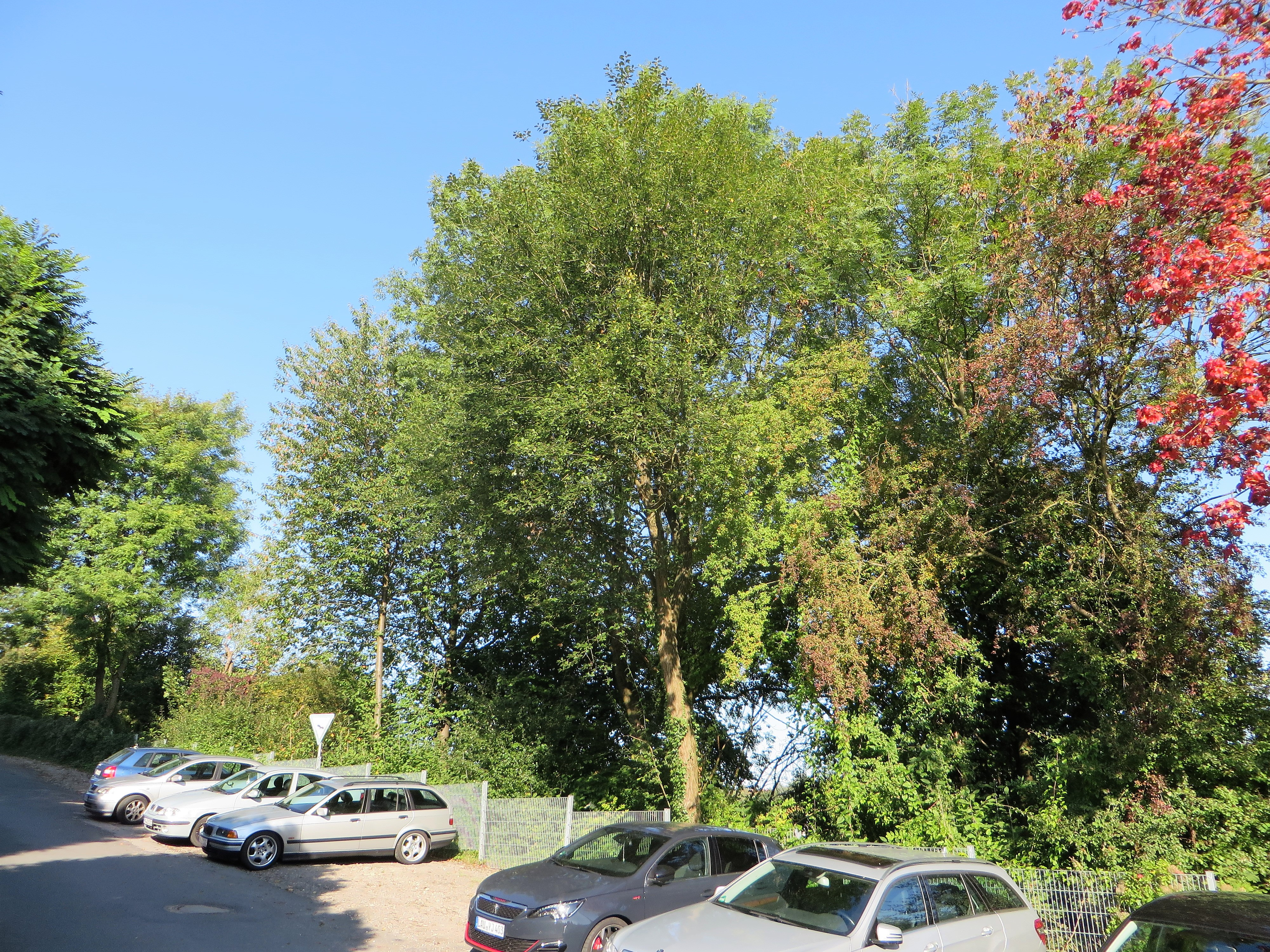 Geschützter Landschaftsbestandteil 1.4.2.47 „Weißdornhecke Rissestraße“ in Hagen. Die Hecke erstreckt sich im Anschluß an den Friedhof „Remberg“ entlang der Rissestraße. Es handelt sich um eine Weißdornhecke in einer Böschung.